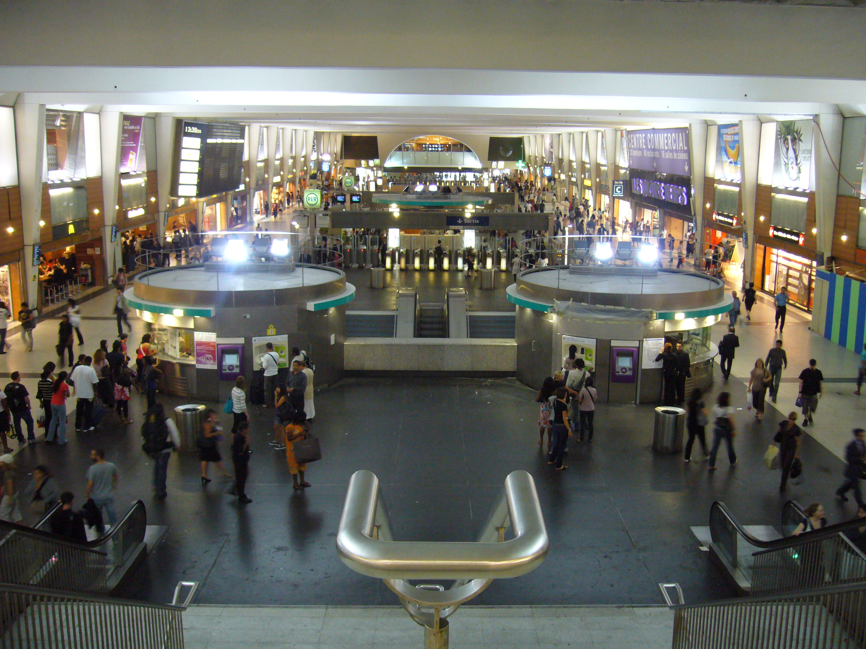 Vue générale de la gare de La Défense.